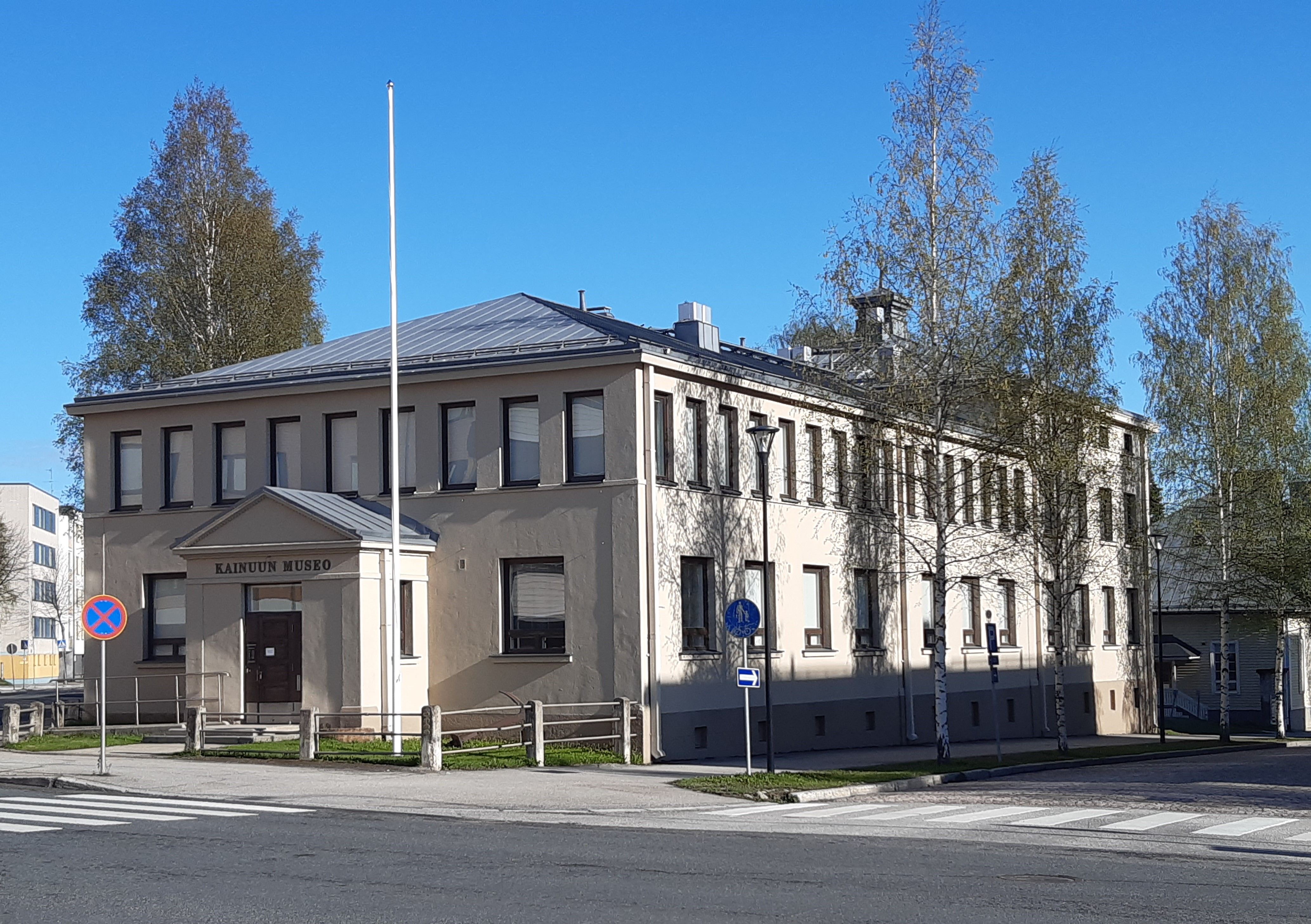 Kainuun Museo